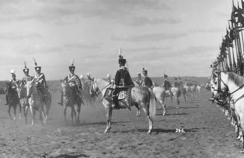 Ernennung des Kronprinzen zum Kommandeur des 1. Leib-Husarenregiments am 15.9.1911. Frontabreiten auf dem Exerzierplatz von Danzig-Langfuhr. von links: Mackensen, Kaiser, Kronprinz